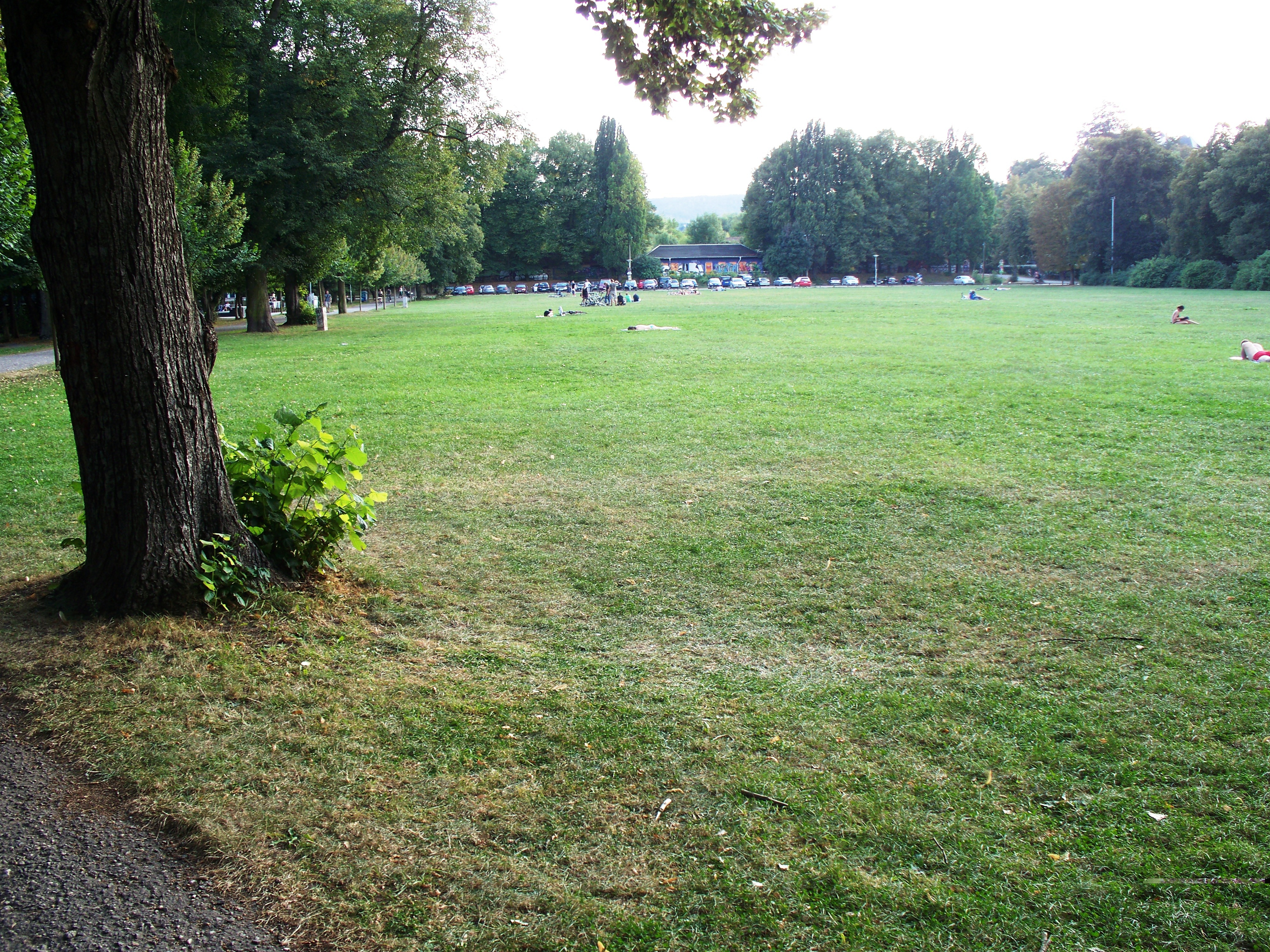 Rasenmühleninsel in Jena